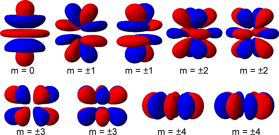 g軌域模型 用 Orbital viewer [1] 製作，再用PhotoImpact 合併